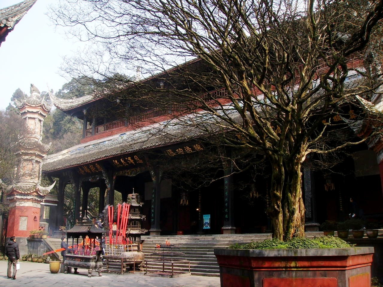 Erwang Temple at Dujiangyan